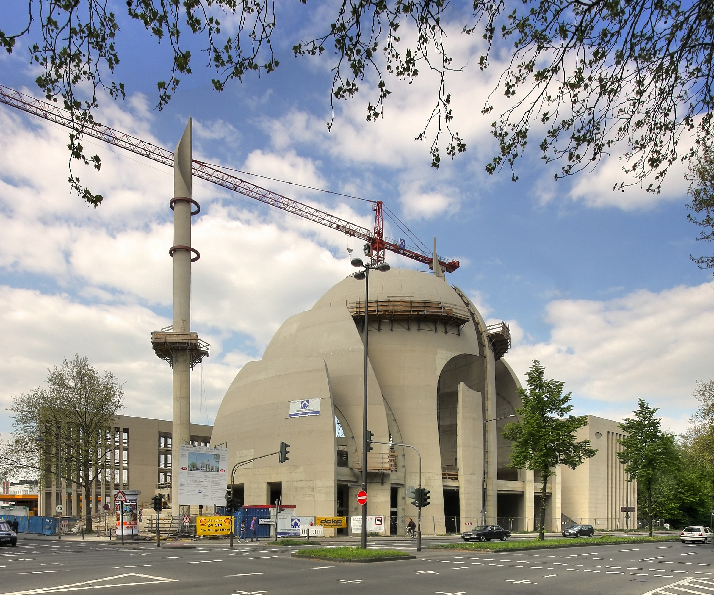 Rohbau der DITIB-Zentralmoschee Köln-Ehrenfeld. Architekt: Paul Böhm und Gottfried Böhm. Grundsteinlegung: 7. November 2009.